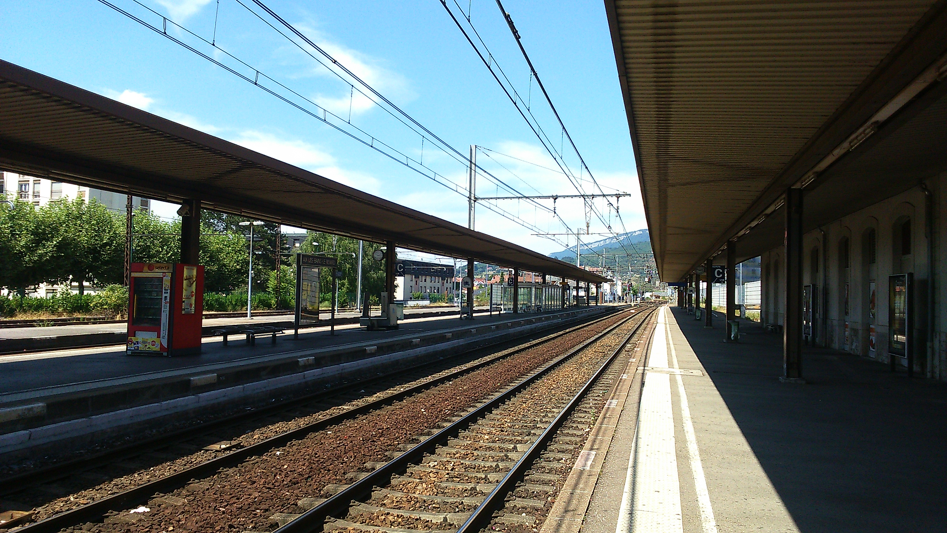 Vue en direction du nord depuis la gare d'Aix-les-Bains-Le Revard